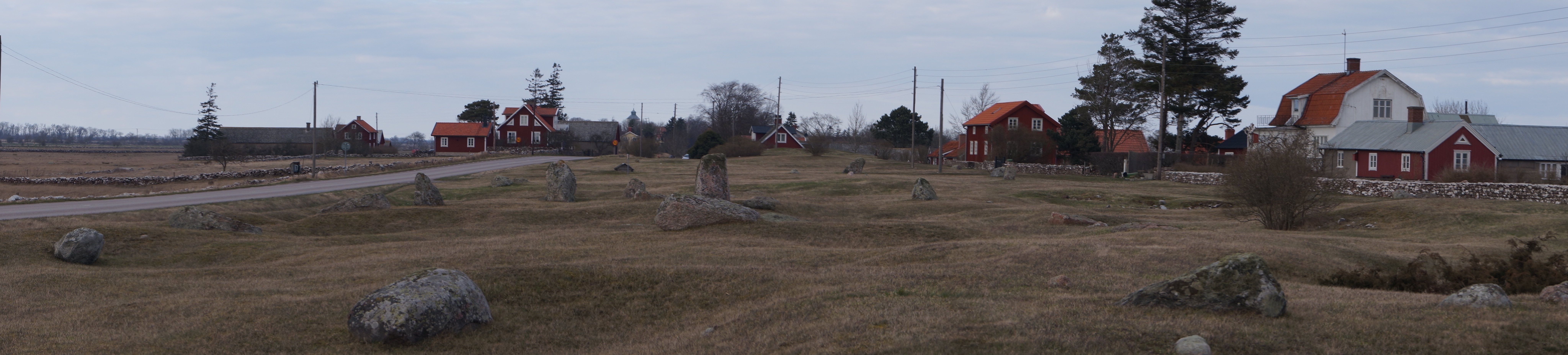 Hulterstad (Hulterstad 86:1) gravfält har 265 gravar. Här finns runda stensättningar, rektangulära stensättningar, högar, resta stenar, klumpstenar samt kantställda kalkstensflisor. Material finns från stenålder, bronsålder samt järnålder.